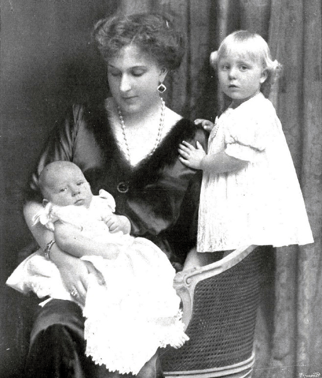 Reina Victoria con sus dos hijos menores, la infantita María Cristina y el infante Don Juan, obra del fotógrafo Christian Franzen, recogido en la revista española Mundo Gráfico.